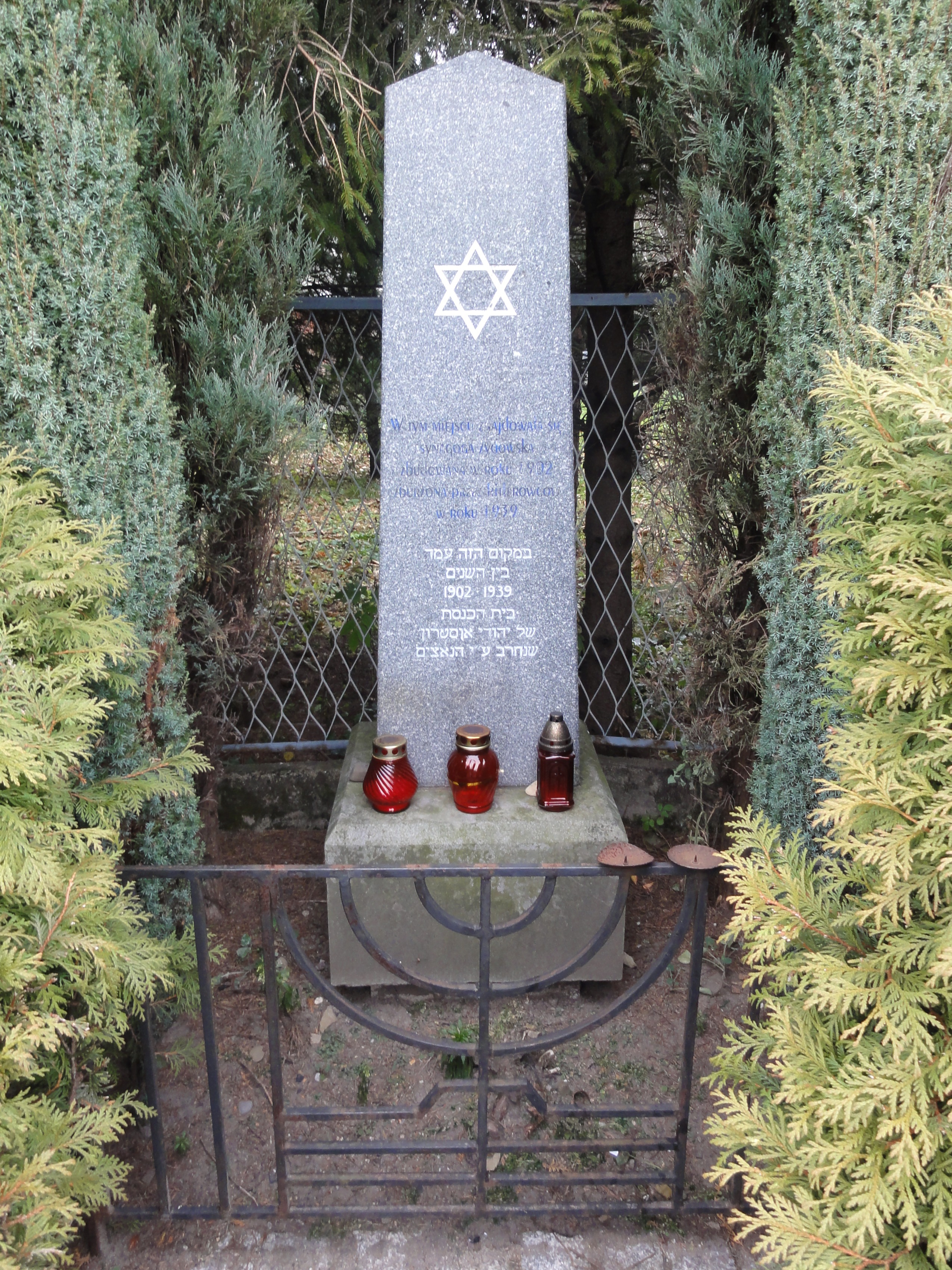 Pomnik upamiętniający istnięjącą w Ustroniu synagogę na rogu ul. Ogrodowa i Dąbrowskiego